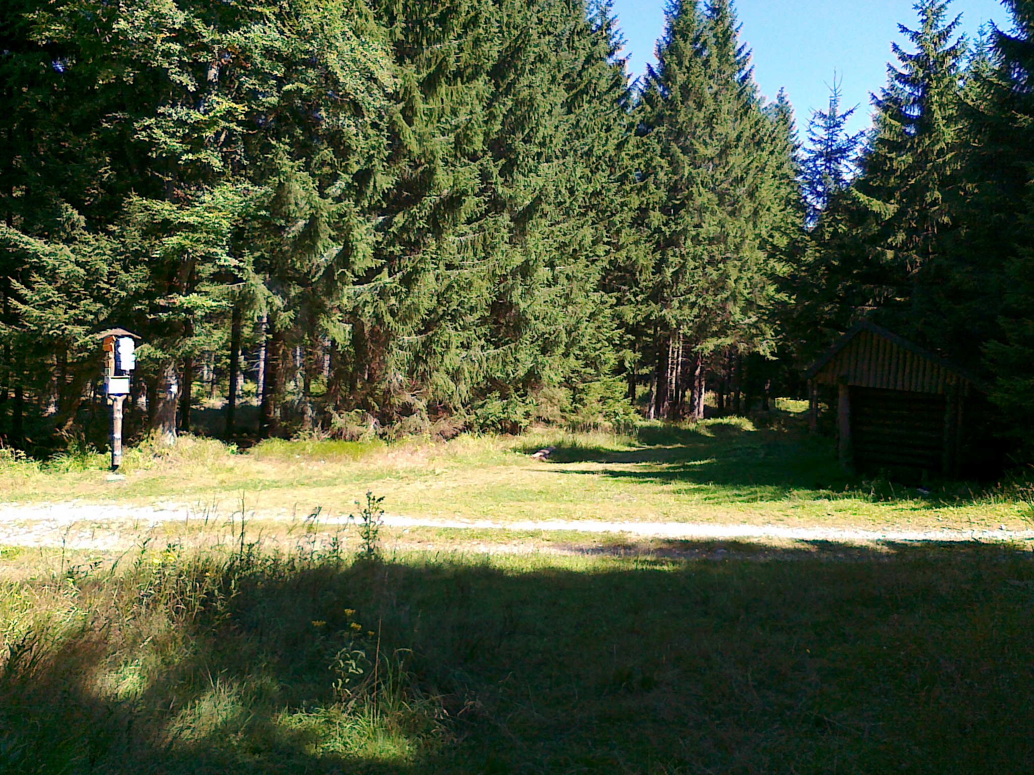 Skrzyżowanie szlaków o nazwie Lysý vrch, rozc.